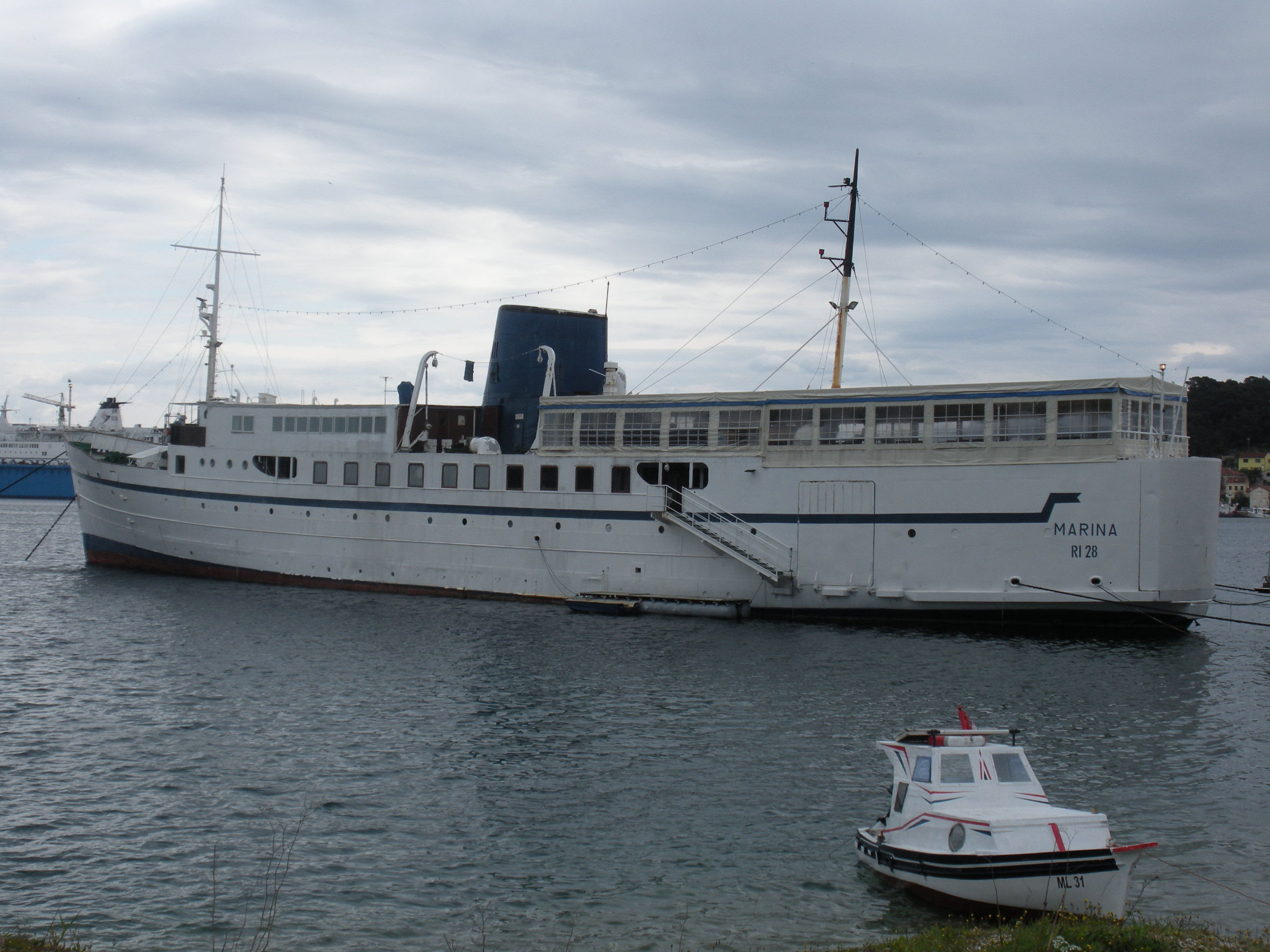 Upokojena motorna ladja Marina privezana v Lošinjski luki.